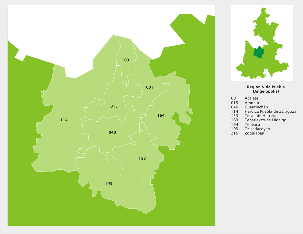 Mapa de la Región de Puebla, Puebla, México